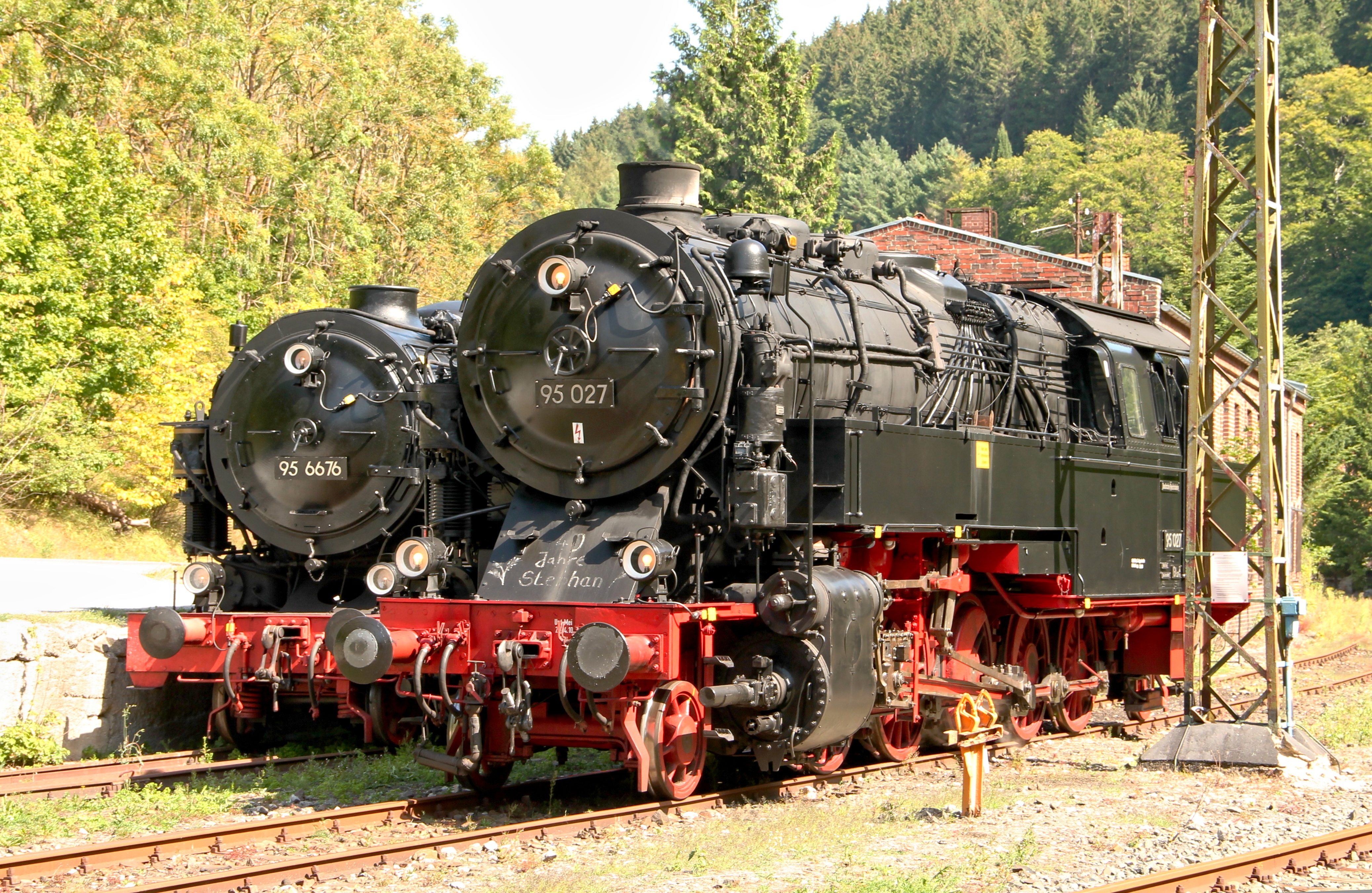 Dampflokomotiven 95 6676 der DR ex HBE "Mammut" (Borsig 10353/1919) und 95 027 (Hanomag 10185/1923) beide 1´E 1´h2t in Rübeland Güterbahnhof am 19.August 2012